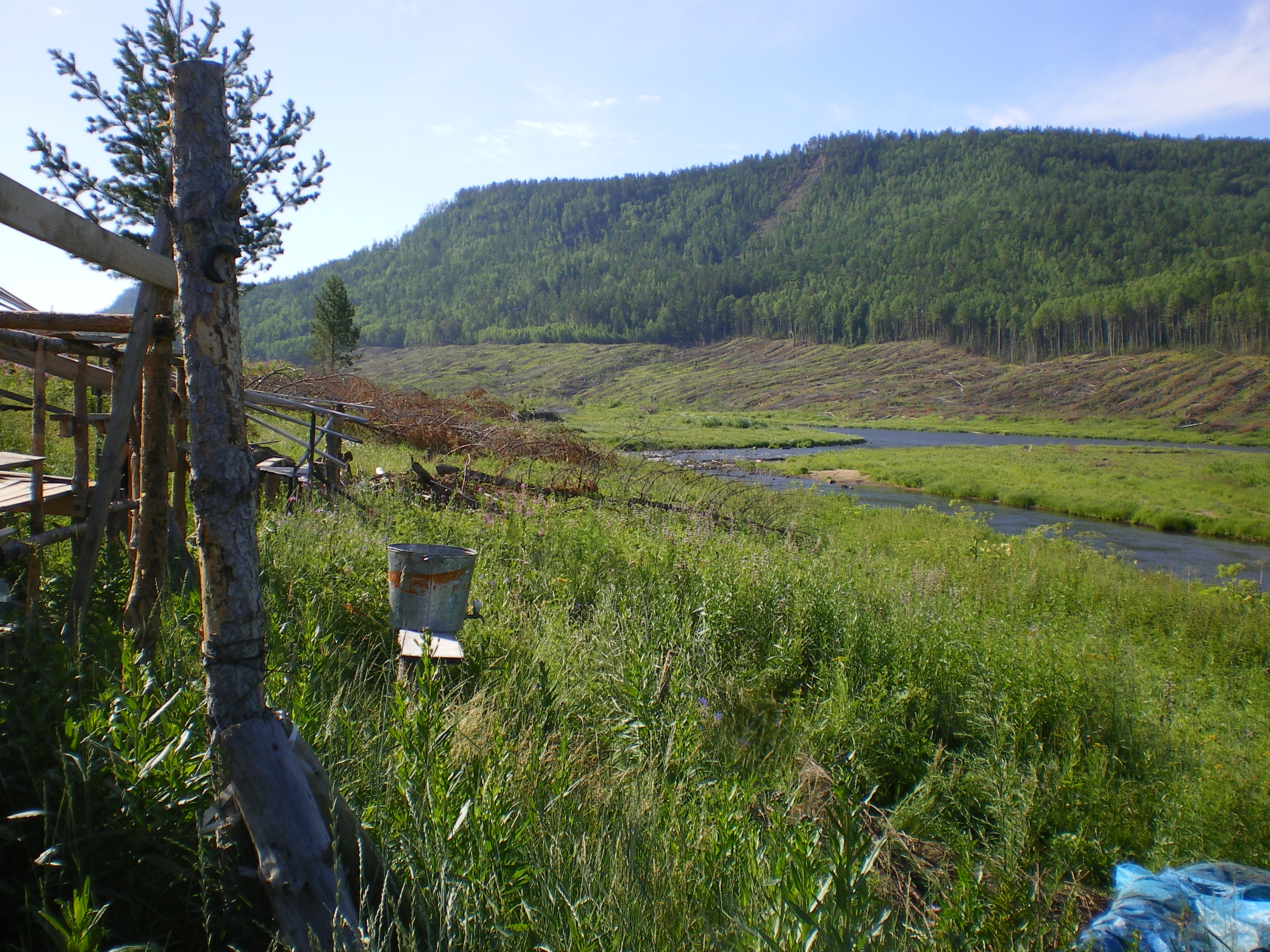 Кова